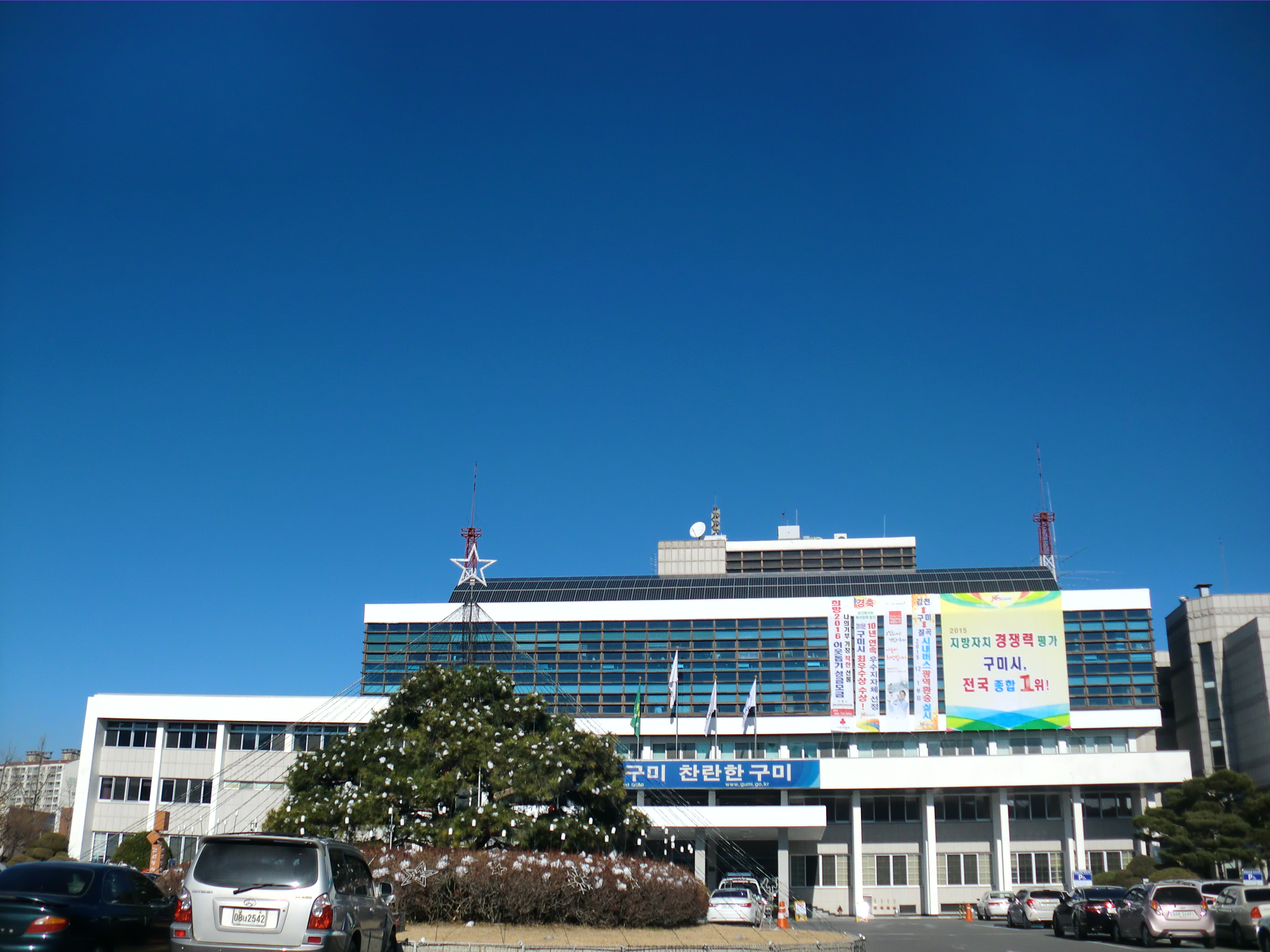 경상북도 구미시에 있는 구미시청